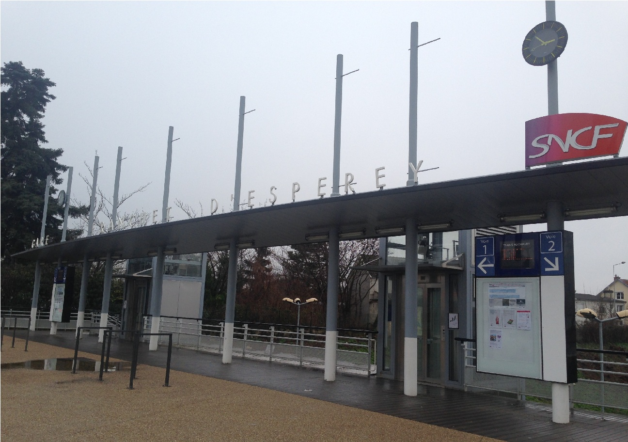 Gare de Franchet d'Esperey-2016